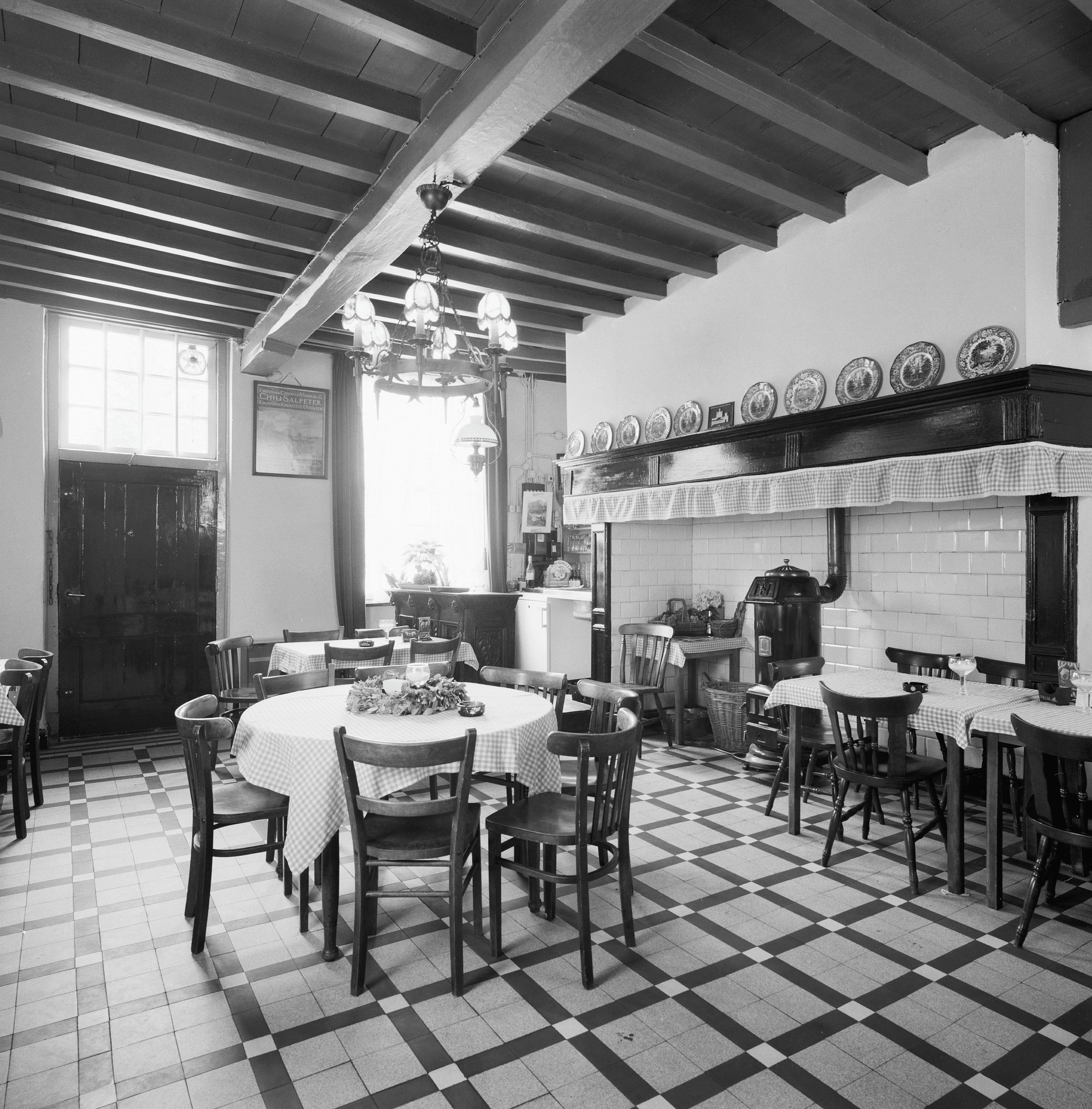 In Den Anker: Interieur café, overzicht